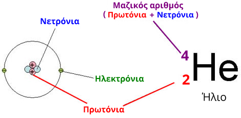 Επεξήγηση του συμβολισμού που χρησιμοποιείται κατά την περιγραφή του ατομικού και του μαζικού αριθμού.